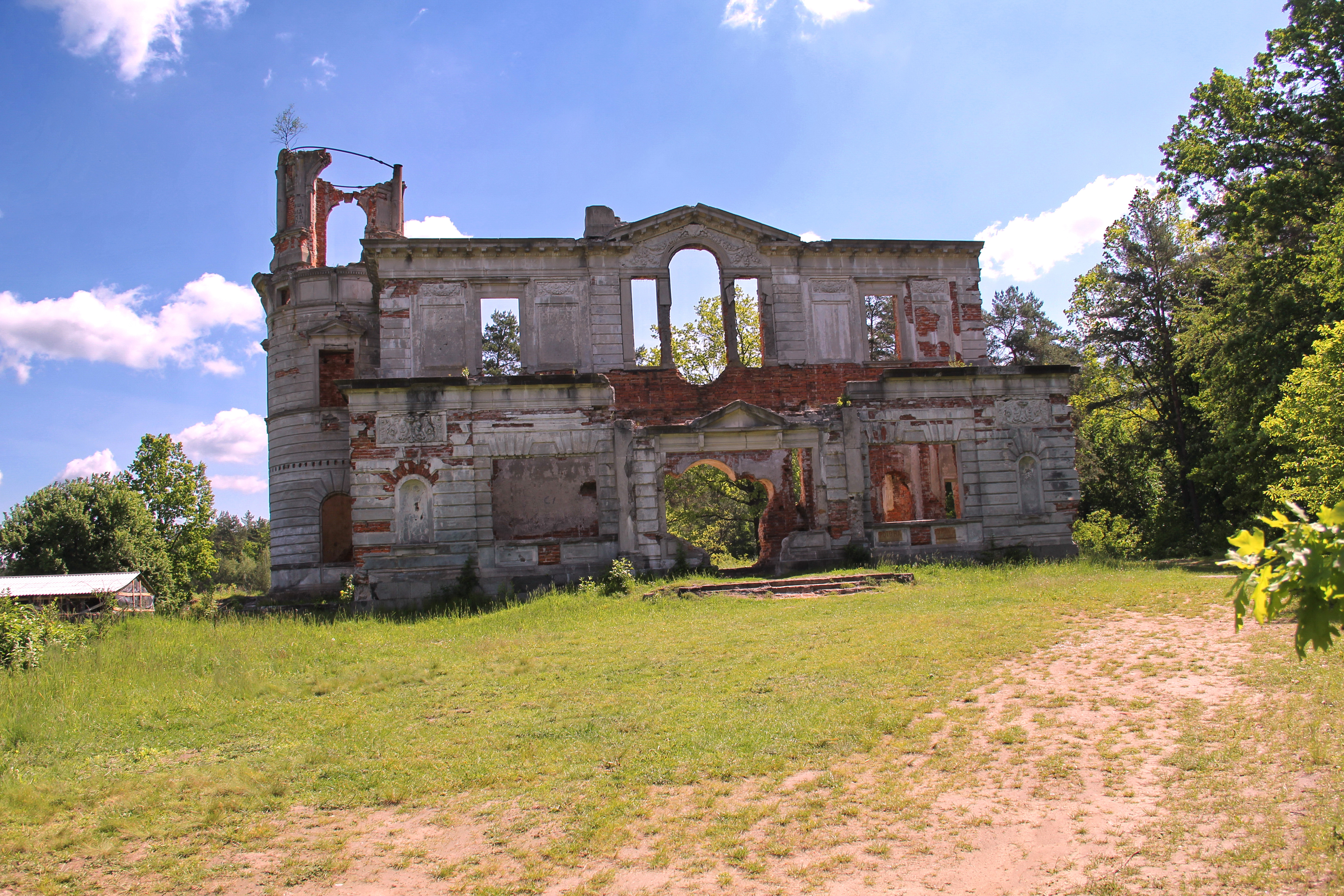 Руїни палацу Терещенків. Фасад.